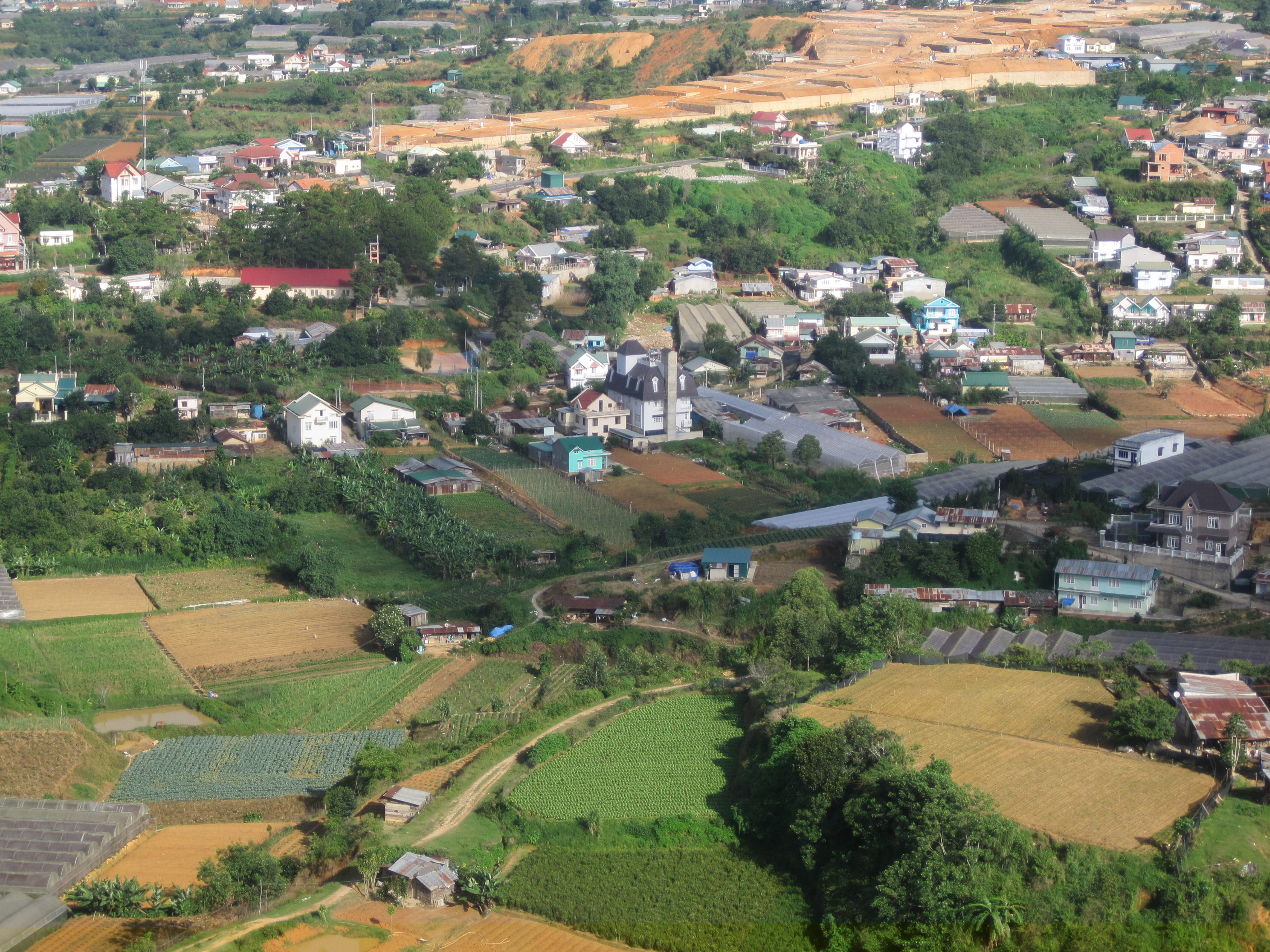 Overview of Da Lat